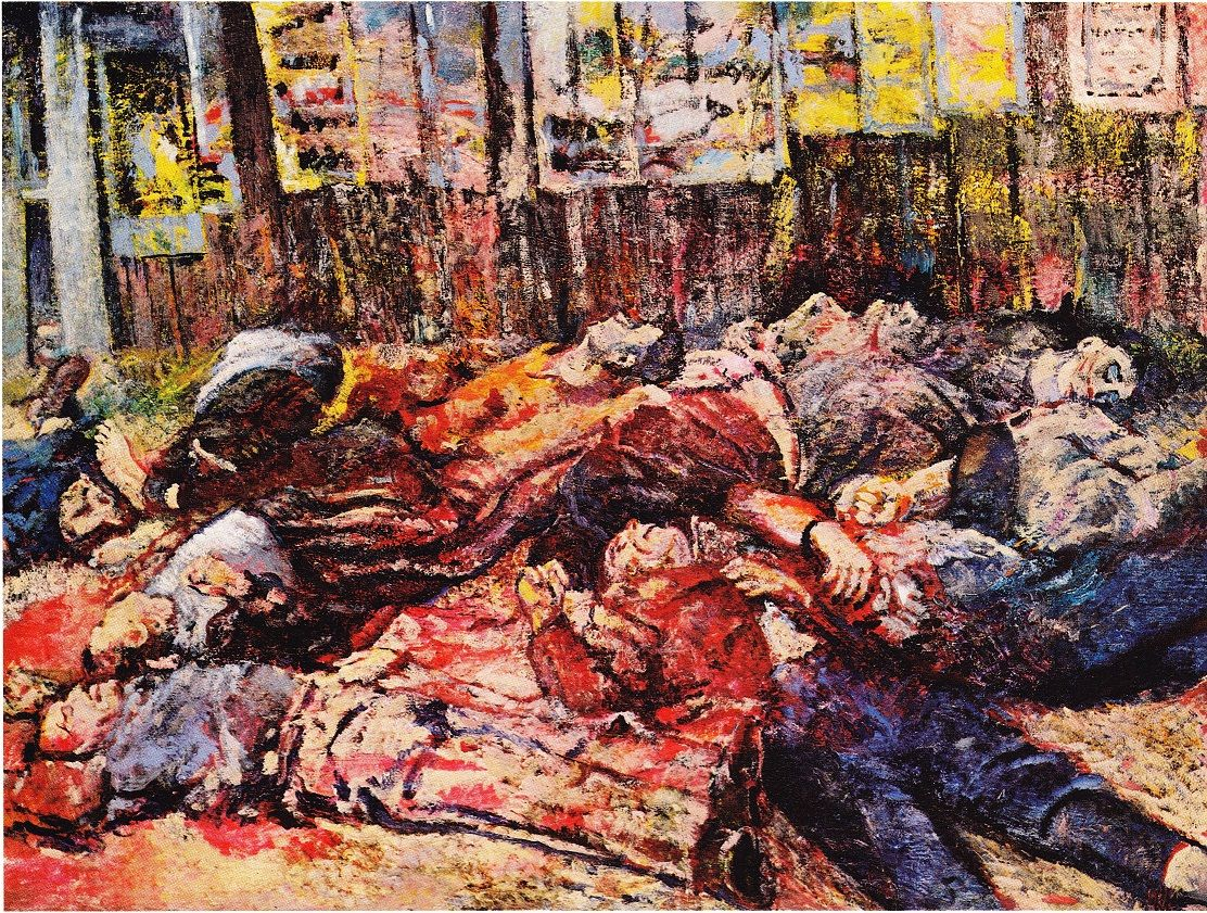 Aligi Sassu dipinse questo quadro sotto l'impressione della fucilazione dei quindici partigiani uccisi gruppo Oberdan delle Brigate Muti il 10 agosto 1944. Il dipinto porta anche il nome La guerra civile (cfr. scheda). Fu acquistato nel 1952 dalla Galleria nazionale d'arte moderna di Roma, dove è tuttora esposto.